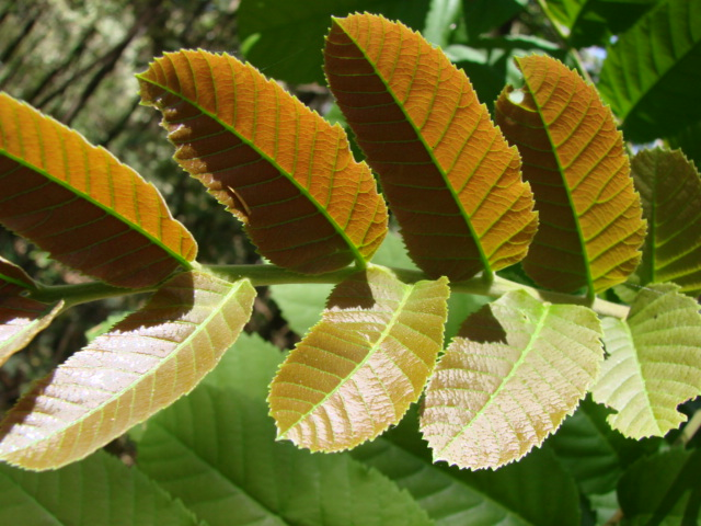 Cupania vernalis Cambess. - SAPINDACEAE - Parque Olhos D'Água - Brasília - Distrito Federal - Brasil.